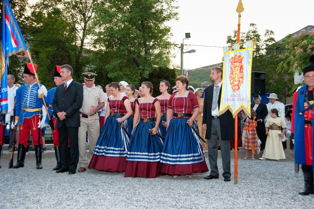 Križevačka djevojačka straža, mimohod povijesnih postrojbi HV u Bakru